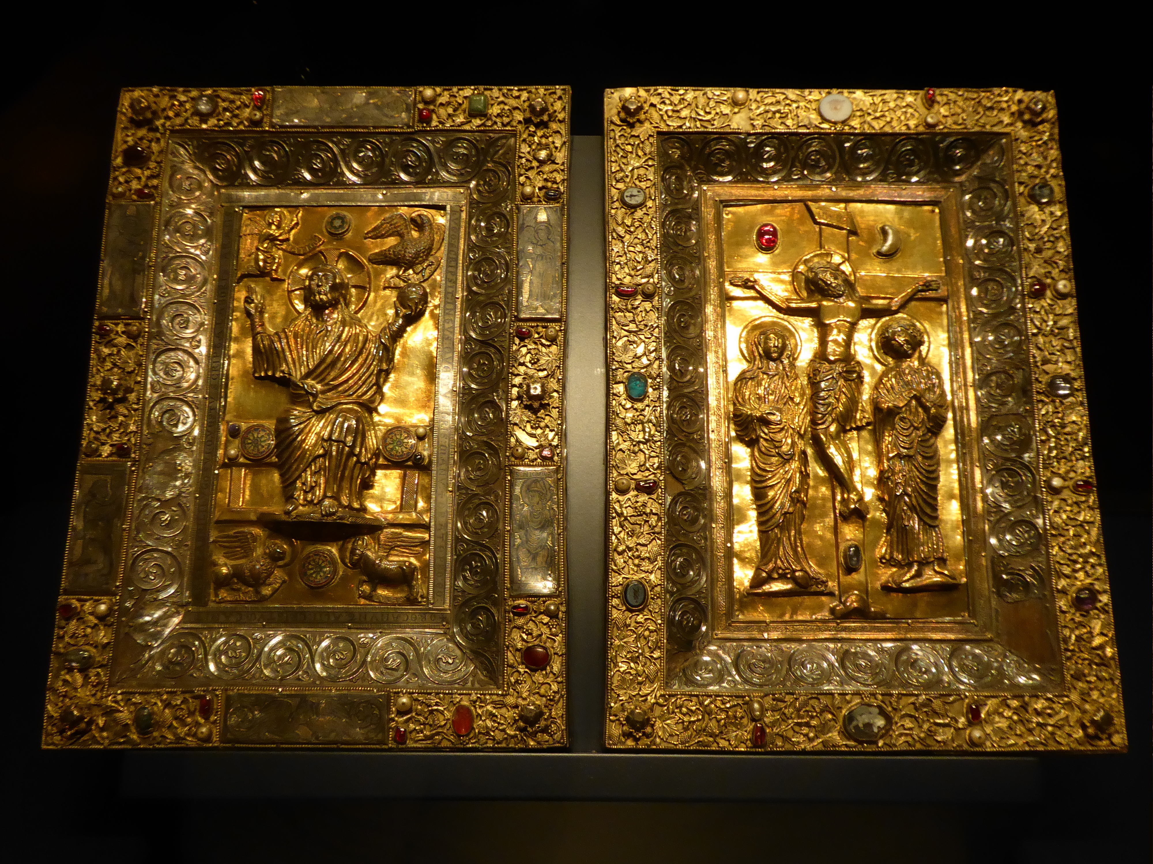 Plats de reliure réalisées vers 1230 par Hugo D'Oignies. Classés parmi les "32 pièces du trésor d’Oignies, Hugo d'Oignies et atelier" comme trésor de la Communauté Française depuis le 26 janvier 2010.